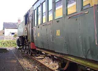 Photo Bruno Robert "Voiture ETAT 1923 derrière la locomotive 030 TU 13"